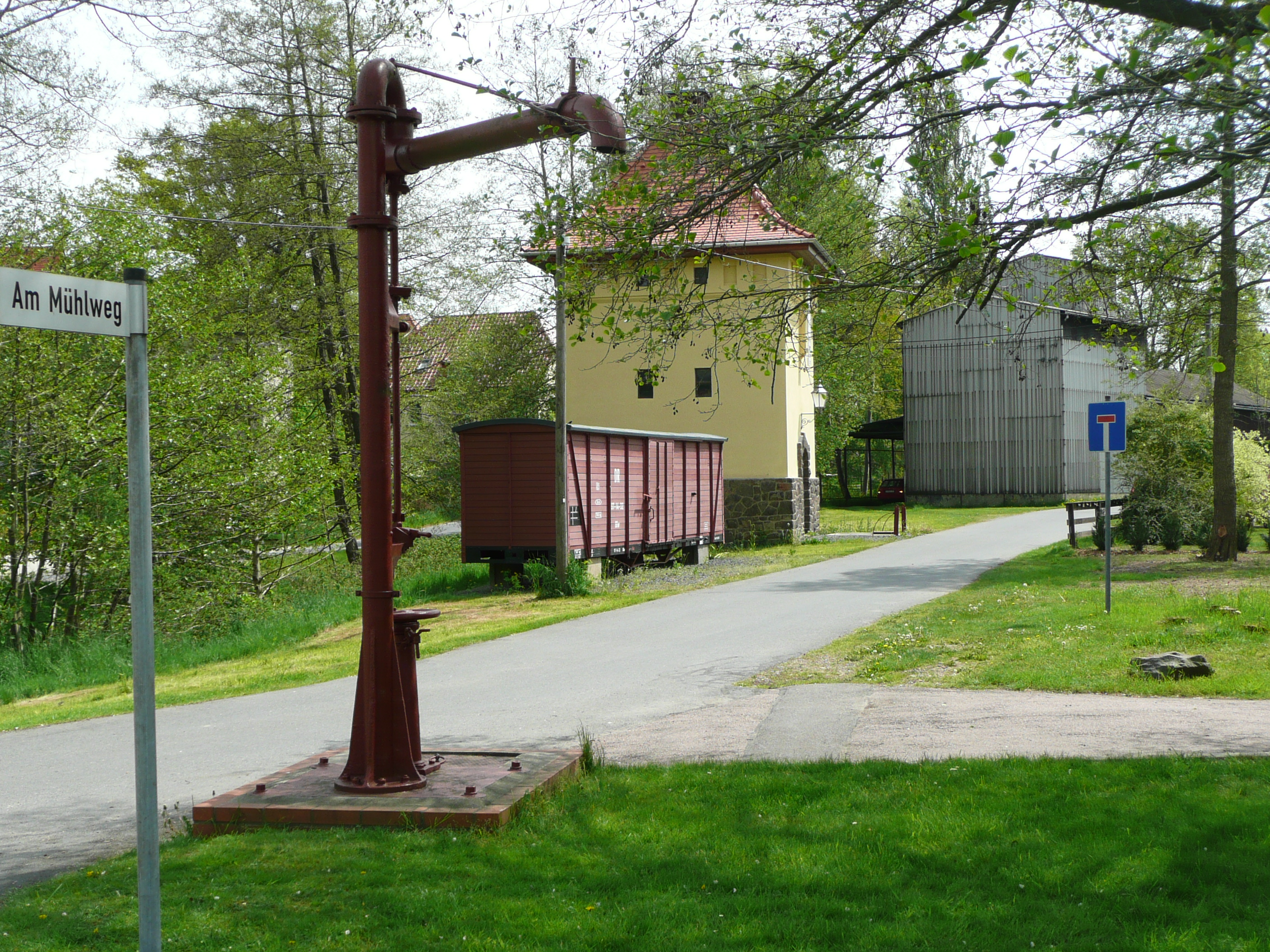 Ansicht des Wasserkranes in Niederschöna